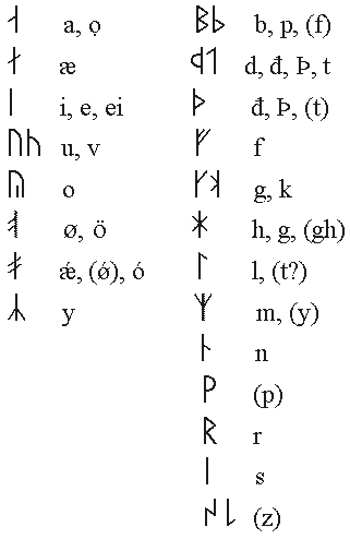 гренландские руны. сайт Арильда Хауге